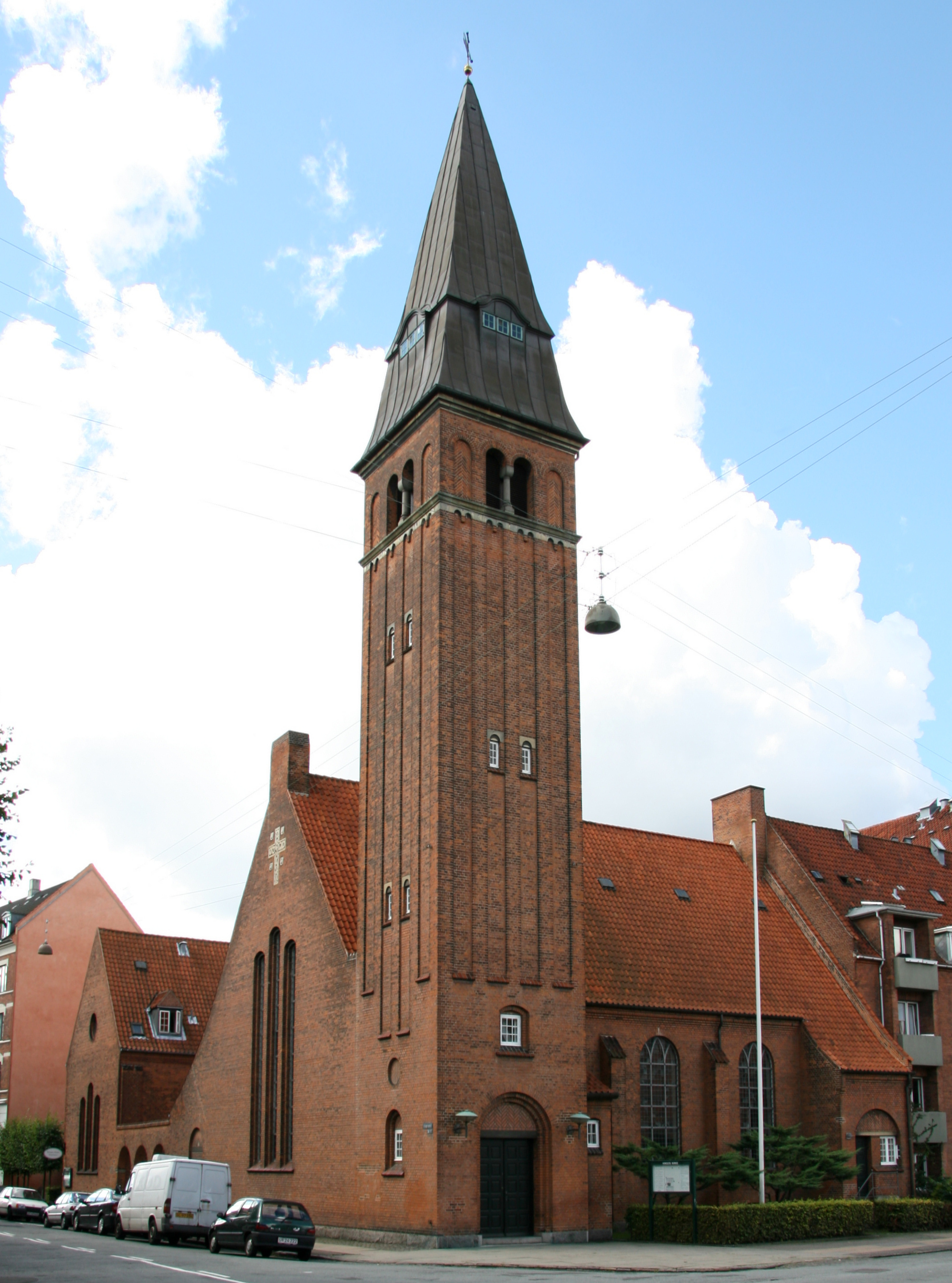 Kingos Kirke in Copenhagen, Denmark.